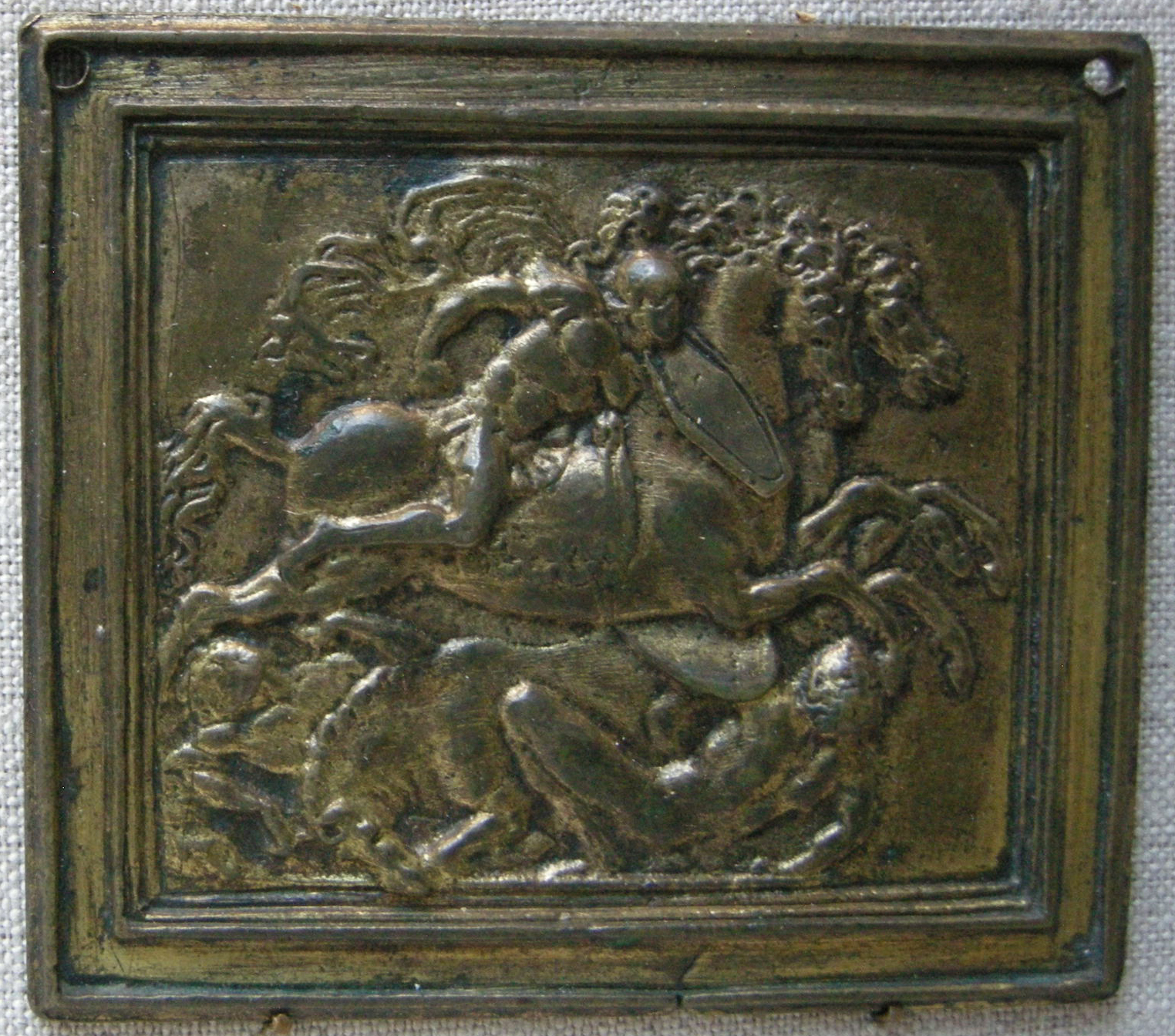 Il moderno e bottega, dubia fortuna (rettangolare), 1510 circa